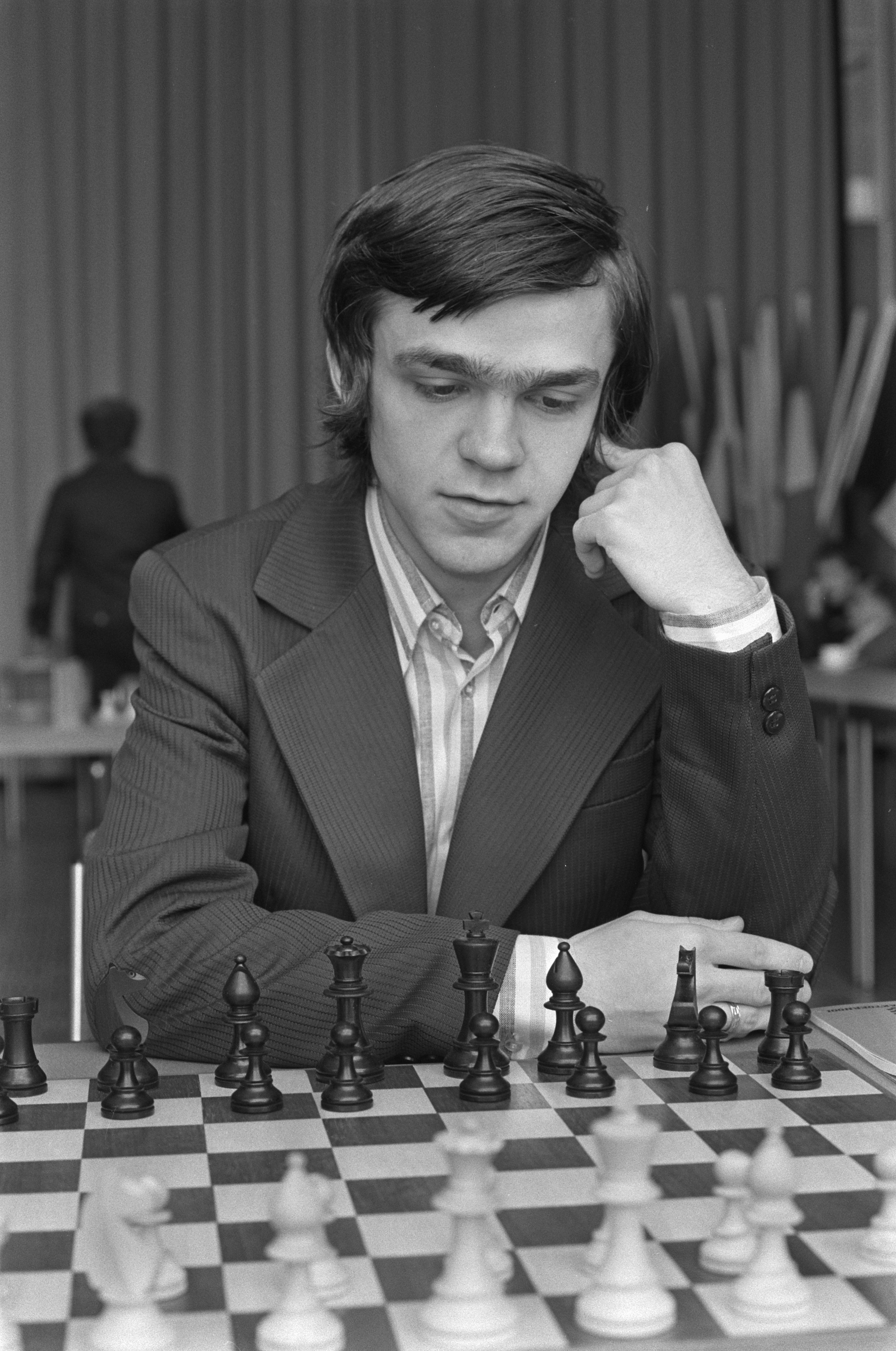 Collectie / Archief : Fotocollectie Anefo Reportage / Serie : [ onbekend ] Beschrijving : IBM-schaaktoernooi in RAI; nr. 8, 9 Ree, nr. 10, 11 Ribli (Hongarije) Datum : 16 juli 1974 Locatie : Hongarije Trefwoorden : schaken Instellingsnaam : IBM-Schaaktoernooi Fotograaf : Croes, Rob C. / Anefo Auteursrechthebbende : Nationaal Archief Materiaalsoort : Negatief (zwart/wit) Nummer archiefinventaris : bekijk toegang 2.24.01.05 Bestanddeelnummer : 927-3294